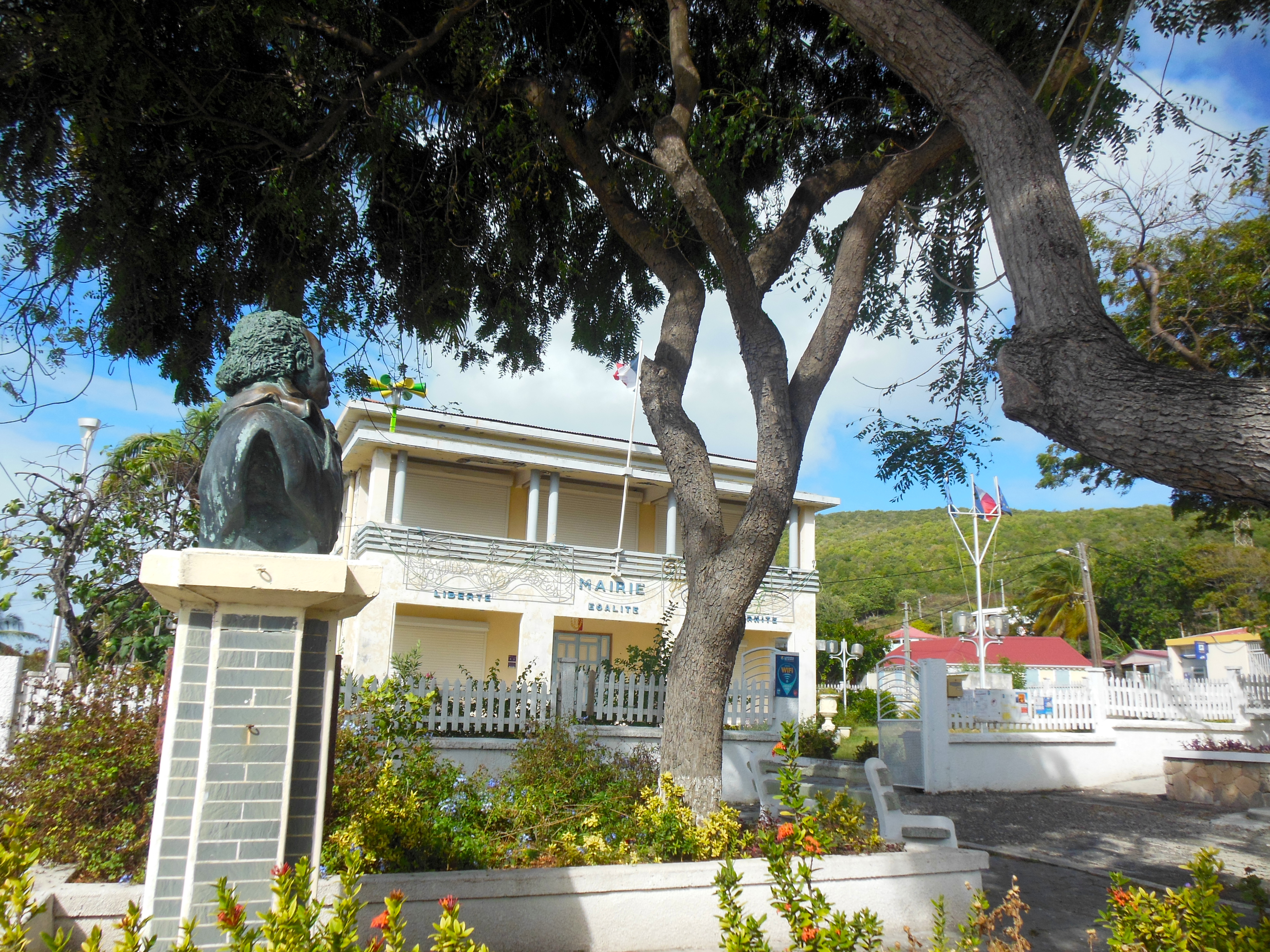 La MAIRIE DE LA DESIRADE. Au premier plan, le buste de Delgrès